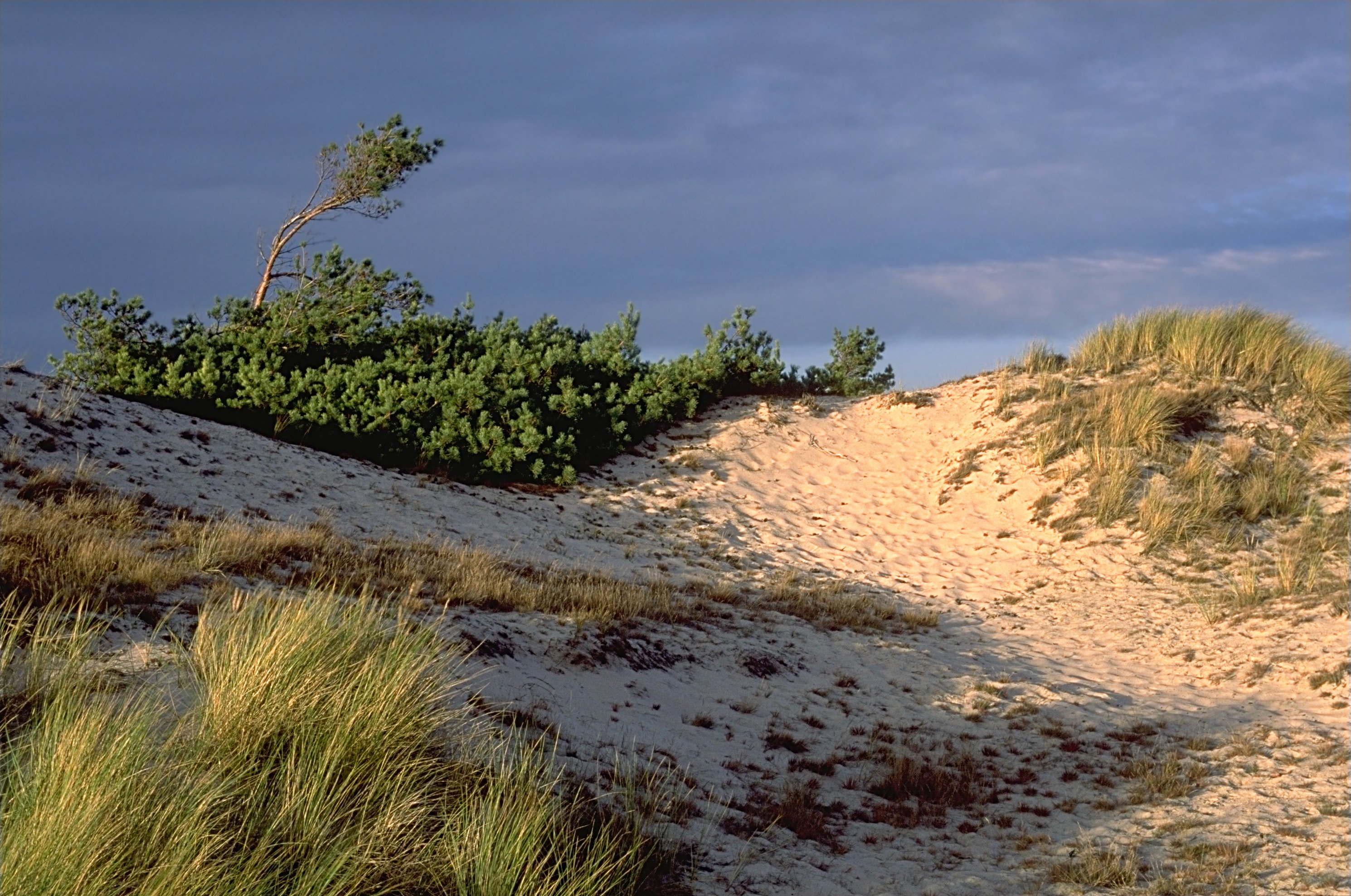 Dune at Darß. Baltic Sea – de: Düne im Naturschutzgebiet Darßer Ort Photo was taken using the following technique: Film: Fuji Slide Lens: 4/35-70 Filter: none Body: Minolta Dynax 7 Support: none Image with Information in English Bild mit Informationen auf Deutsch